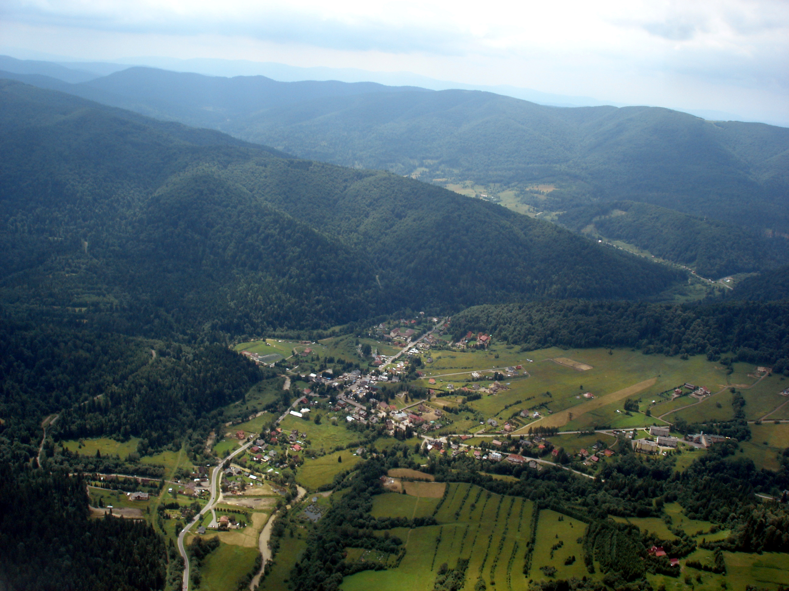 Cisna